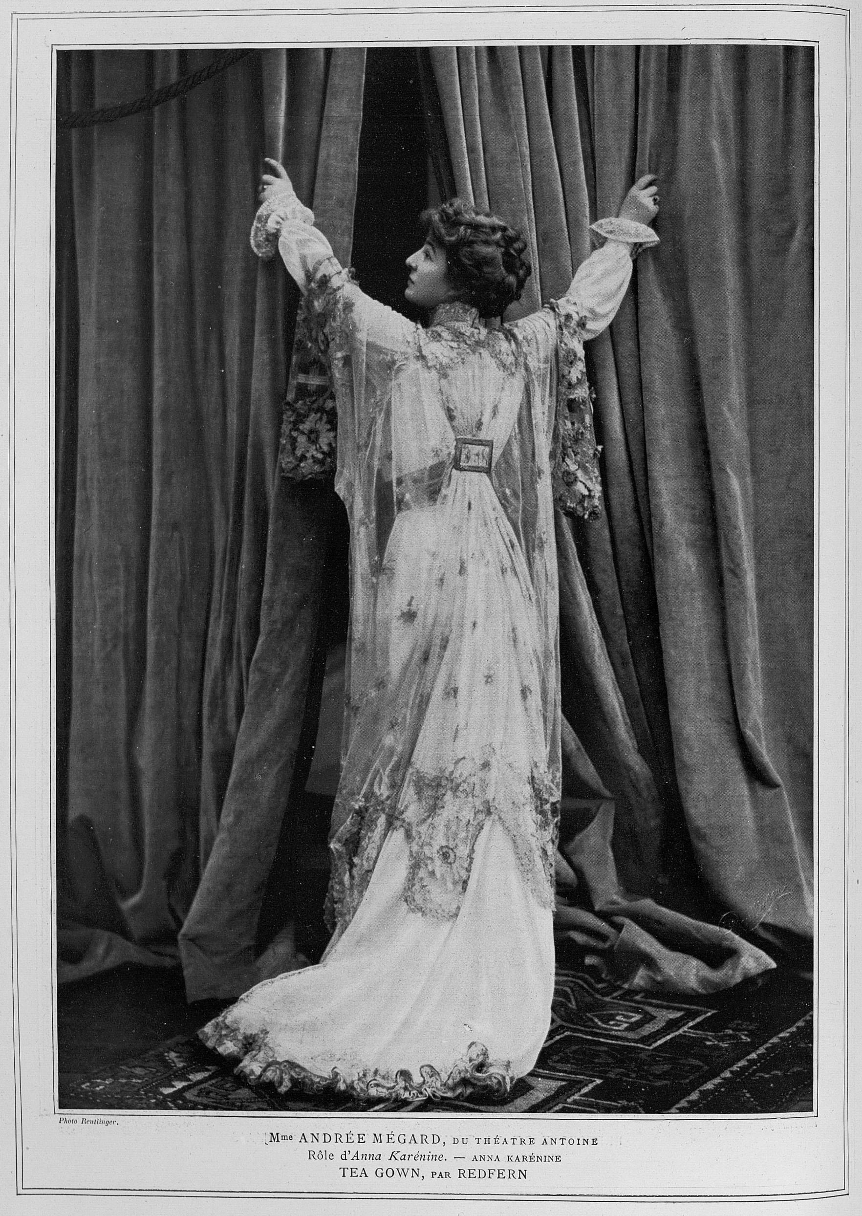 Mlle Andrée Mégard du Théâtre Antoine dans le rôle d'Anna Karénine. "Tea-gown en voile Ninon blanc, jupe avec incrustations de dentelle or. Grand manteau de dentelle or retenu au milieu du dos par une boucle vieil or". Phototgraph in Les Modes : Revue mensuelle illustrée des arts décoratifs appliqués à la femme.